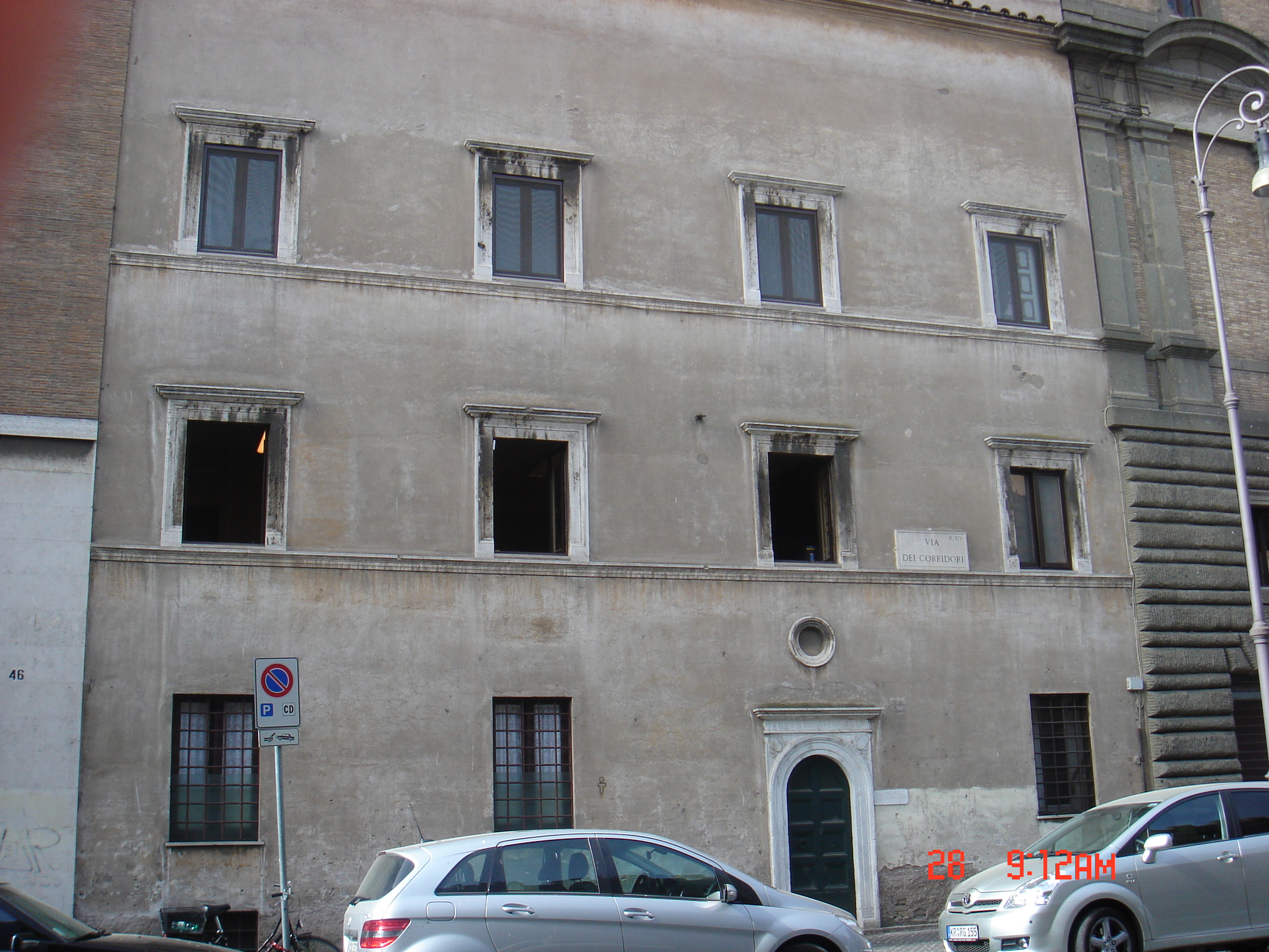 Roma, via dei Corridori. Ricostruzione della facciata rinascimentale della casa di Febo Brigotti, medico di Paolo III.